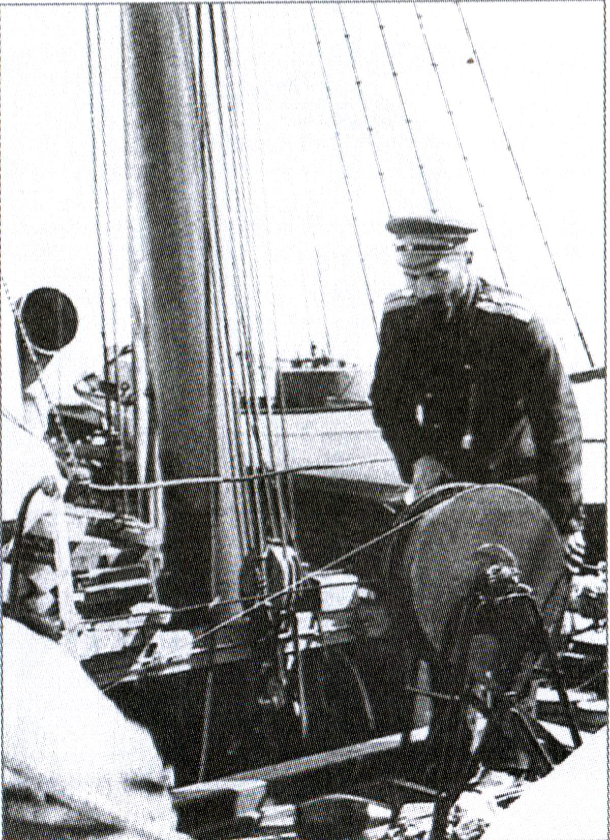 Гидрограф экспедиции Толля лейтенант А. Колчак в Карском море.